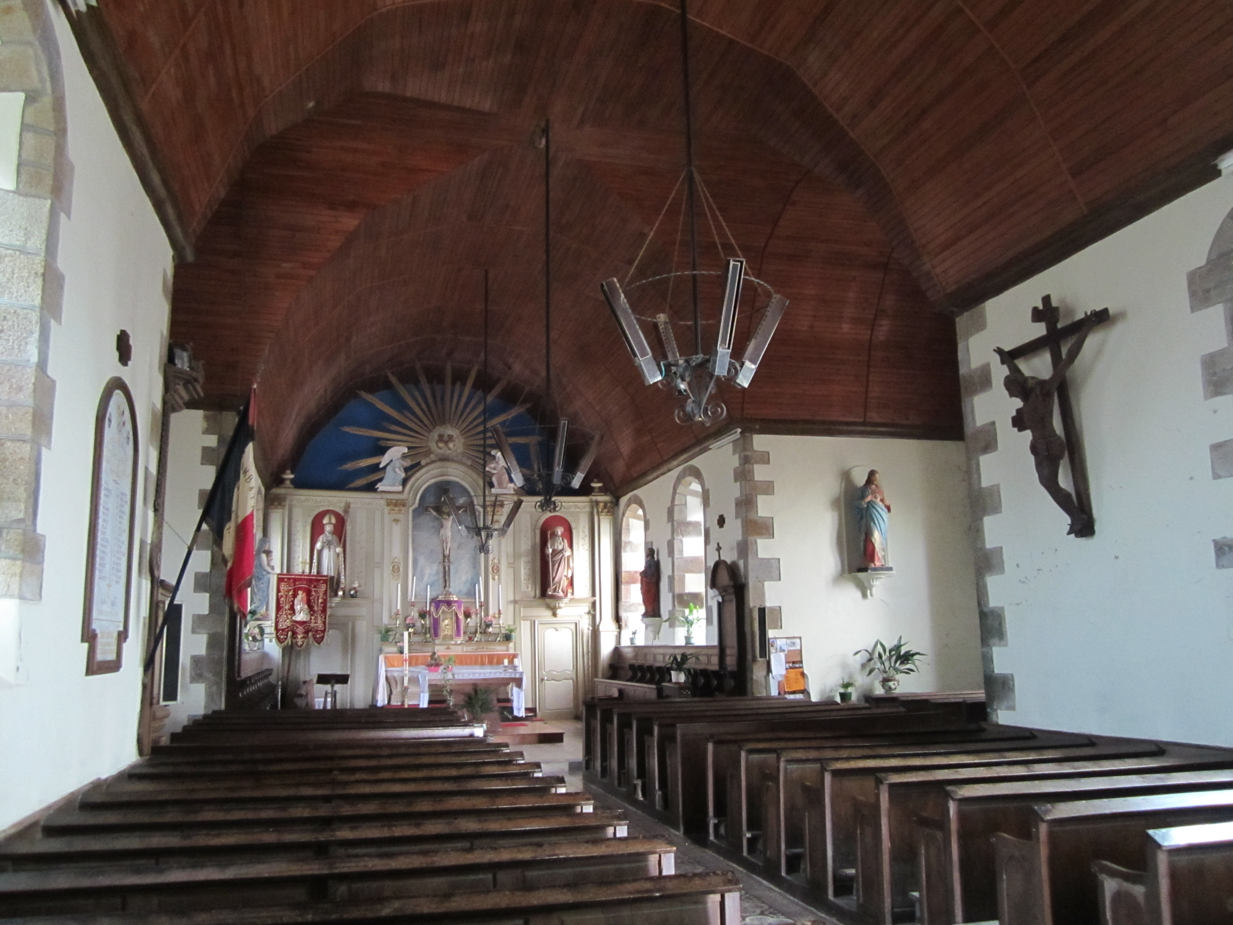 Saint-Martin-le-Bouillant, Manche